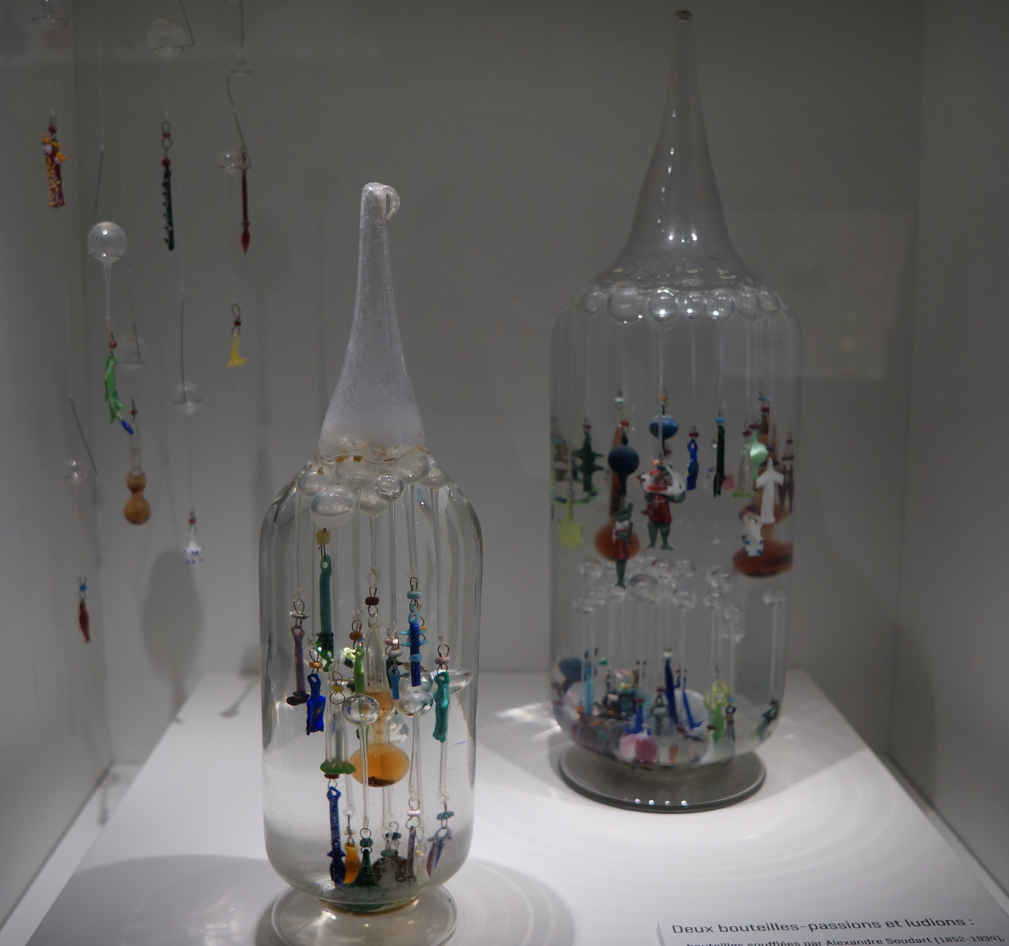 Ludions, Musée du verre de Sars-Poteries Sars-Poteries, Nord (département français)